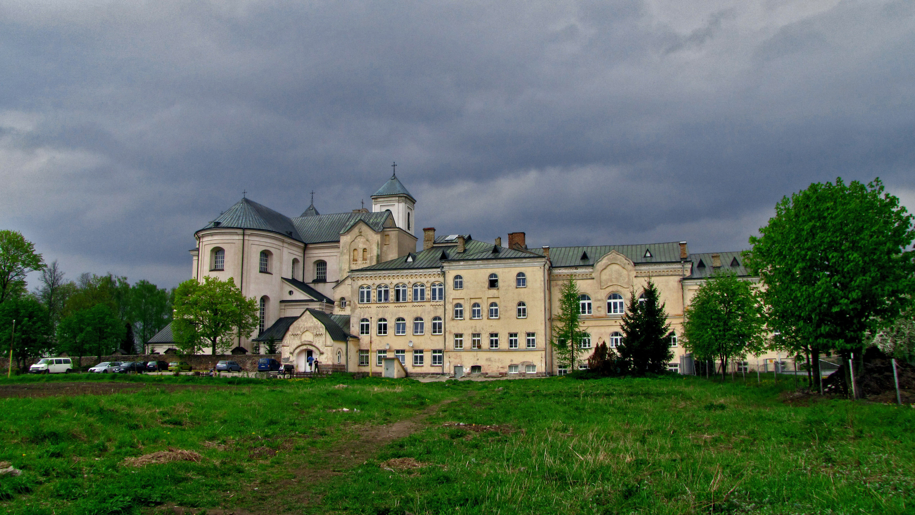 Salezjański ośrodek wychowawczy, dawniej internat żeński (zwany "Drapieżnikiem") w zespole klasztoru prawosławnego 03.1997.